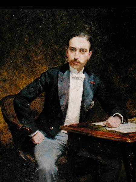 Charles Haas (1832-1902)